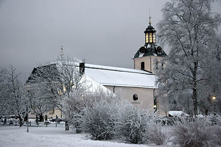 Gagnefs kyrka, dec 2005 Fotograf: Ragnar Nyberg (jag själv) 5 februari 2006 kl.19.02 Ragnarn 450x300 (70046 bytes) (Gagnefs kyrka, dec 2005 Fotograf: Ragnar Nyberg (jag själv))